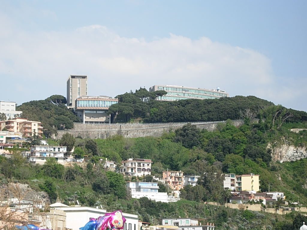 Pozzuoli Foto personale di Inviaggio